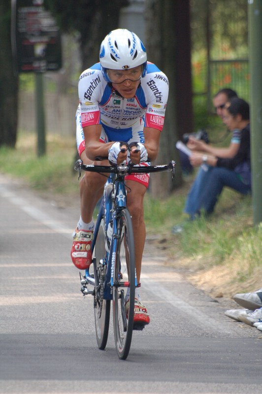 Carlos José Ochoa, Giro d'Italia 2010